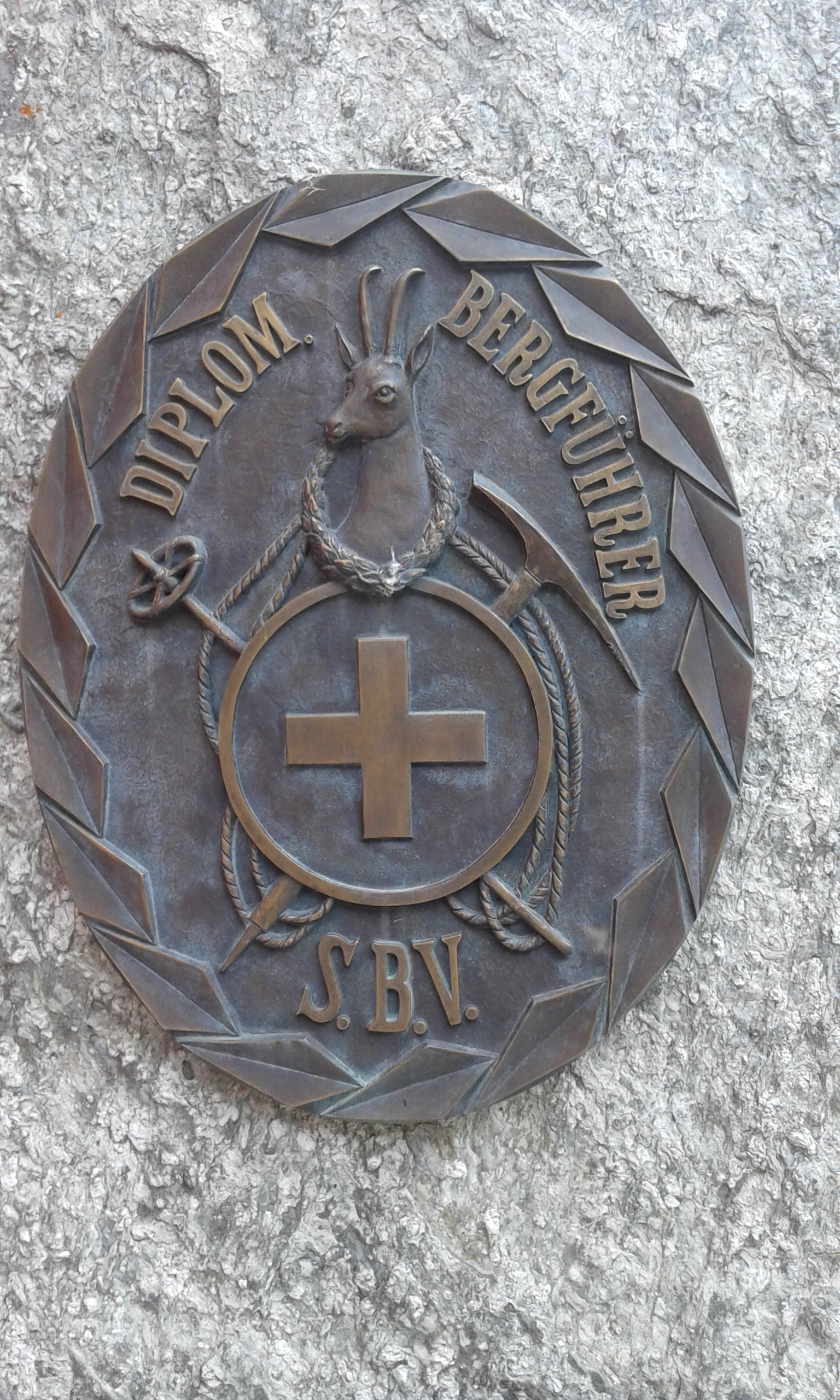 Das Originalabzeichen in Bronze der diplomierten Bergführer des Schweizer Bergführerverbands (S.B.V.) ist auch auf dem Bergführerdenkmal in St. Niklaus Dorf (St. Niklaus VS, Wallis, Schweiz) zu finden.